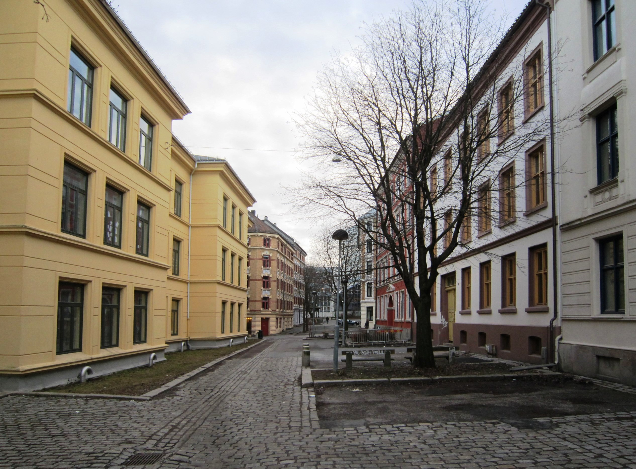 Deichmans gate i Oslo